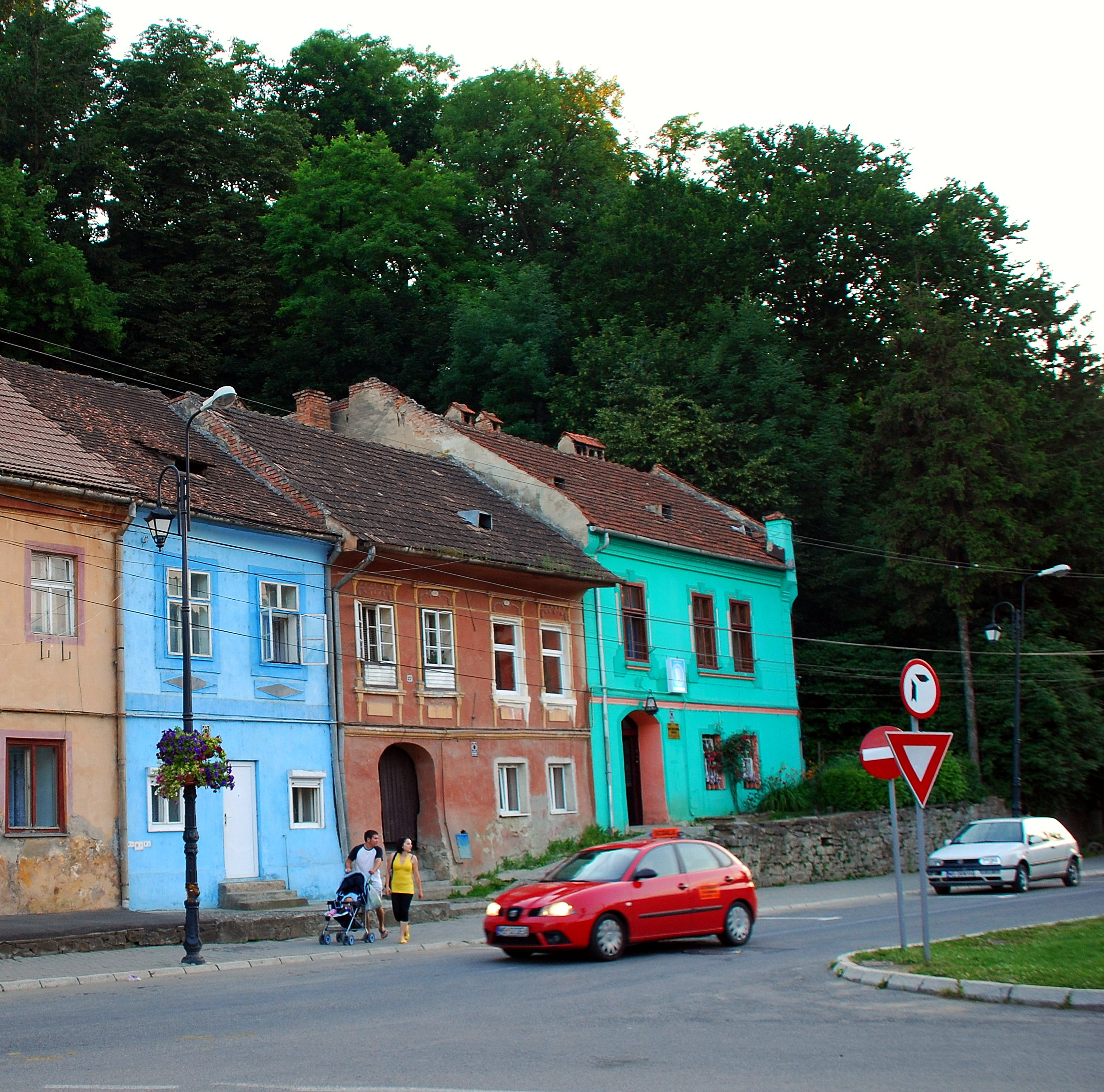 More info: My photostream